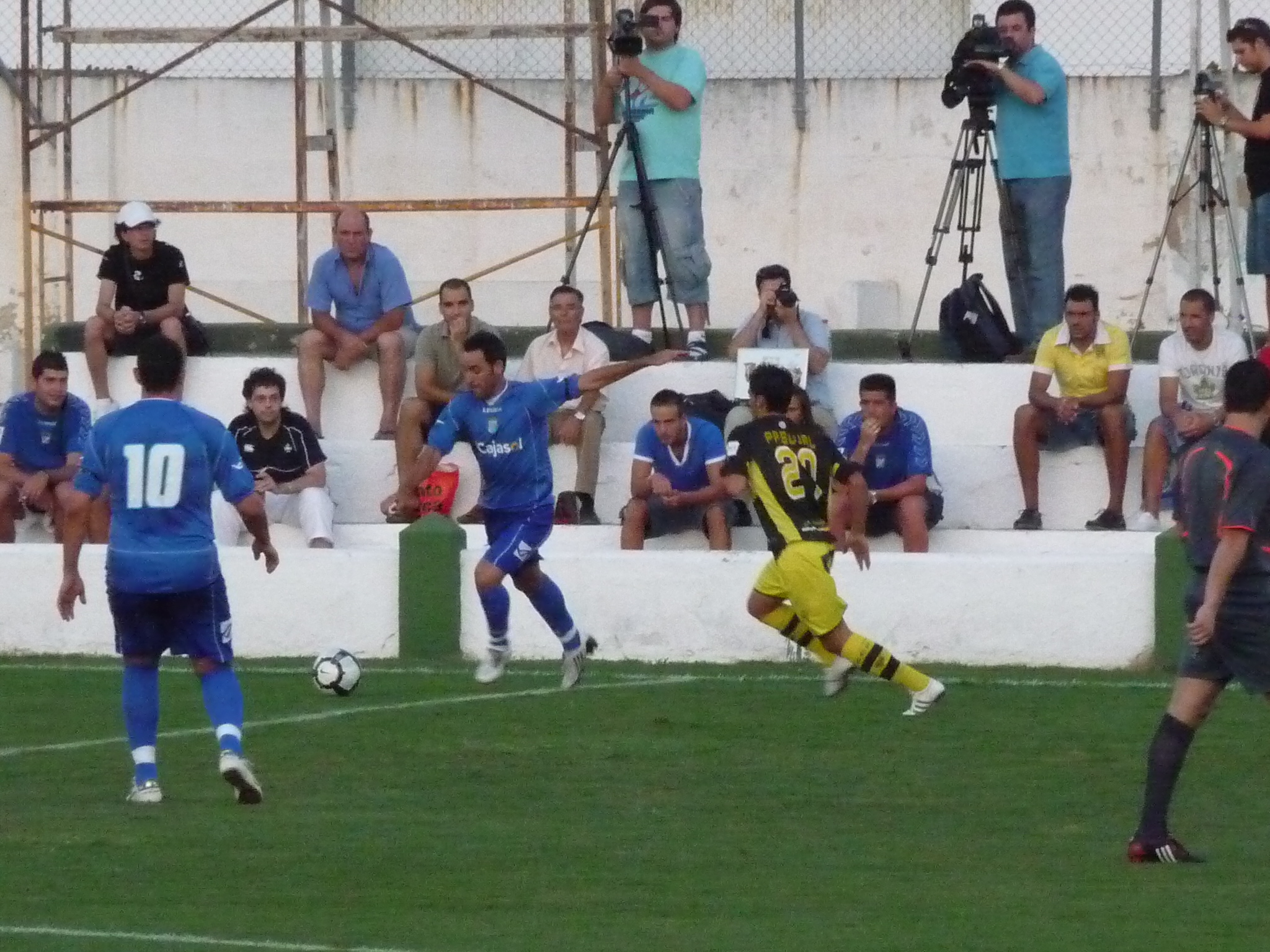 Abel-XerezCD-p1040384.jpg